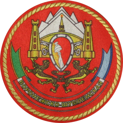 Нарукавный знак 19-й ОМСБр (Владикавказ)